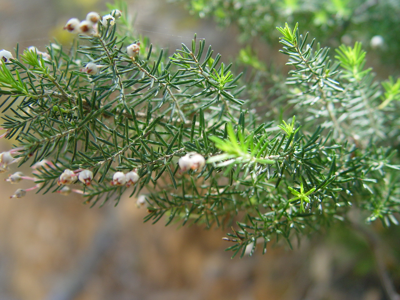 Name Erica arborea Familiy Ericaceae